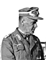 Ludwig Crüwell: General der Panzertruppen